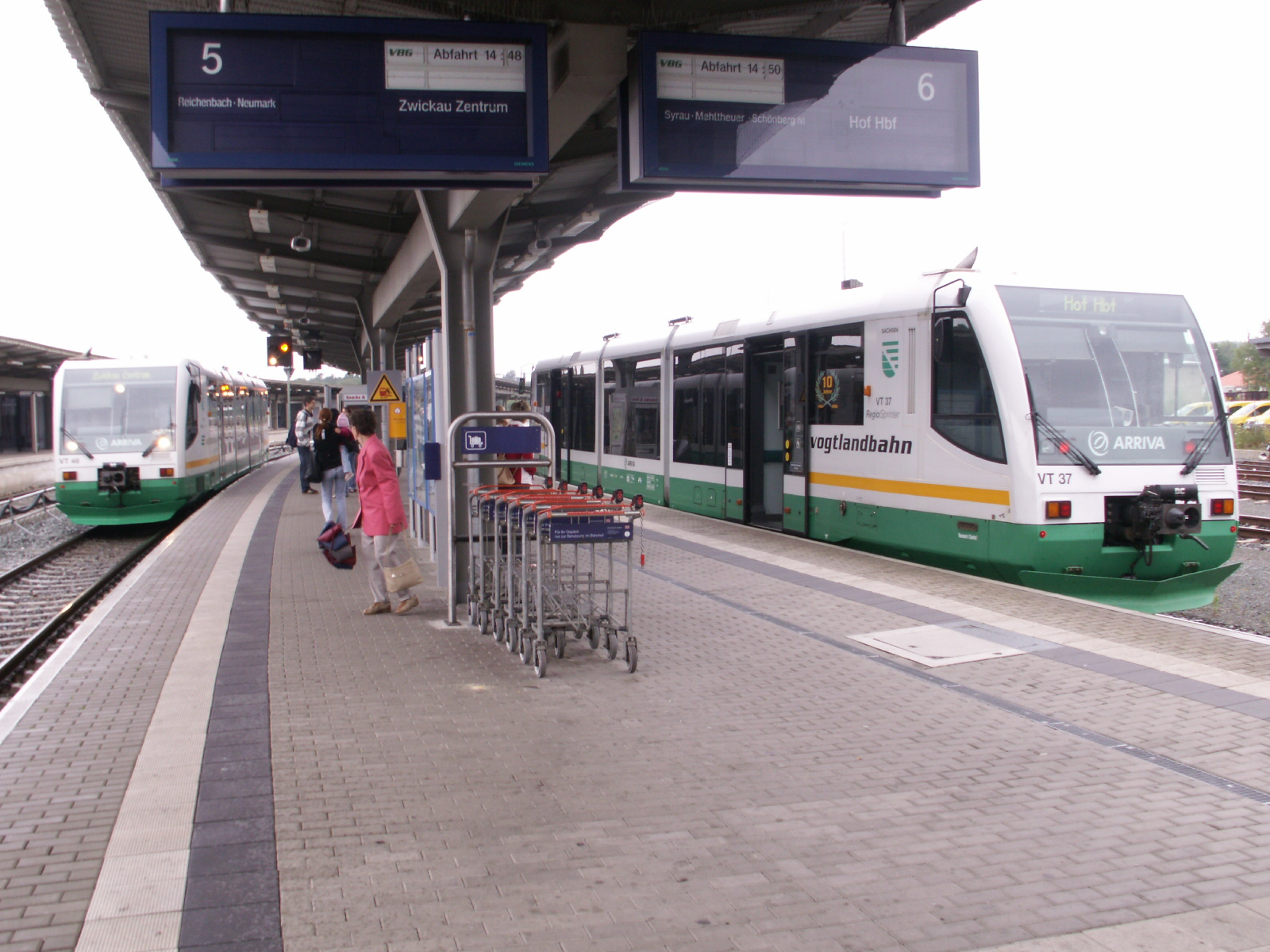 ObererBfPlauen